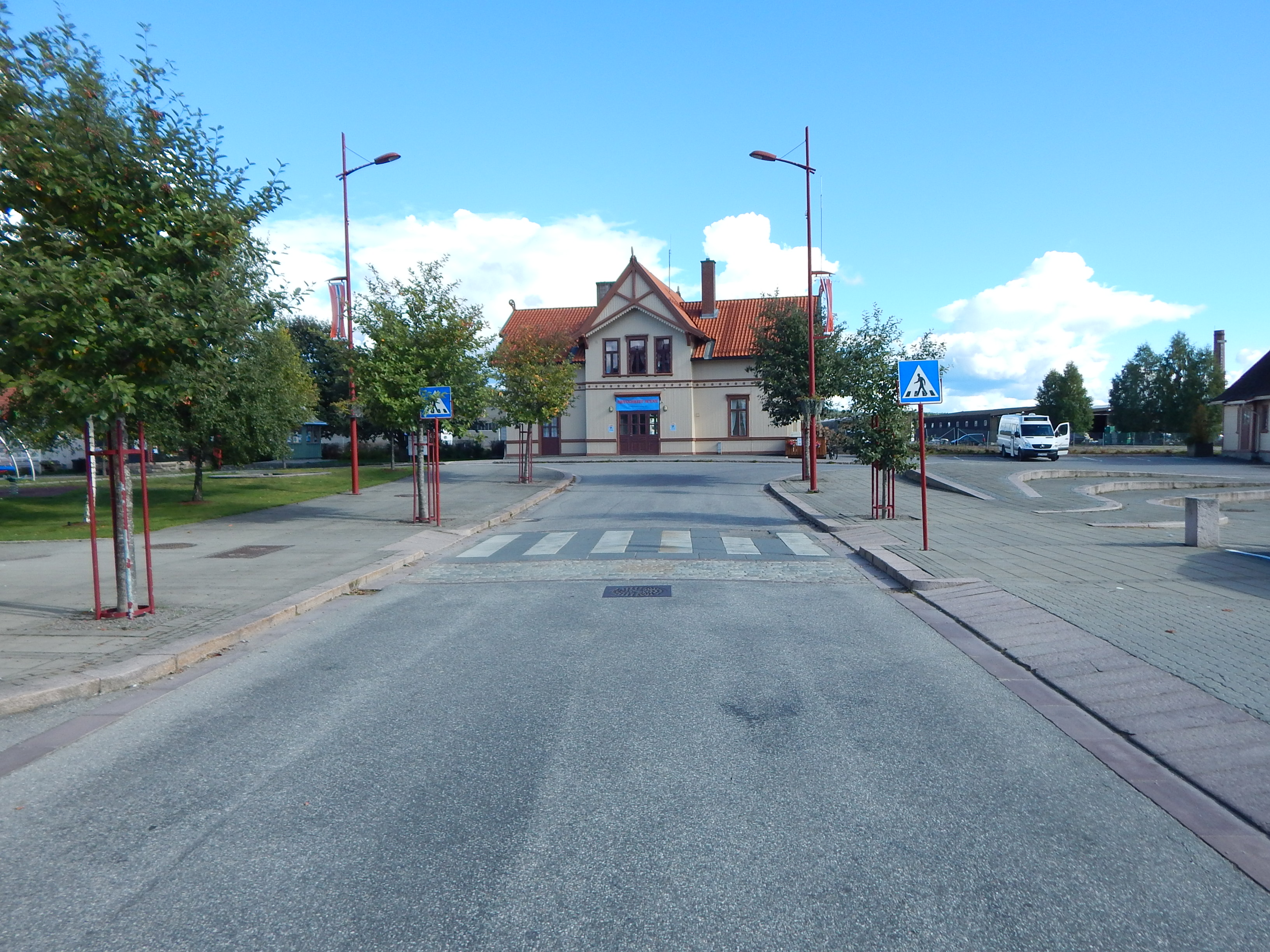 Stasjonsvegn (fylkesvei 406) mot Kirkenær stasjon